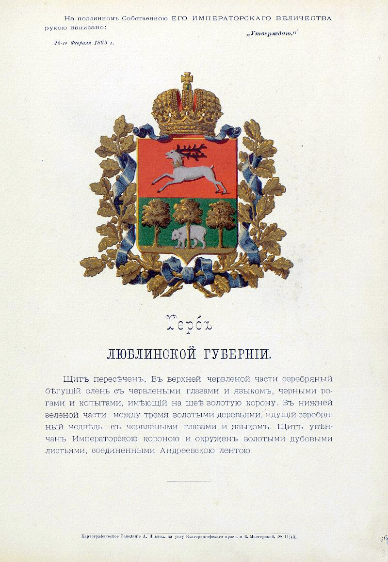 Official Russian Empire coat of arms Lublin Governorate. Герб Российской Империи Люблинской губернии с официальным описанием в Гербовнике Бенке. Утверждён Императором Всероссийским Александром Вторым.